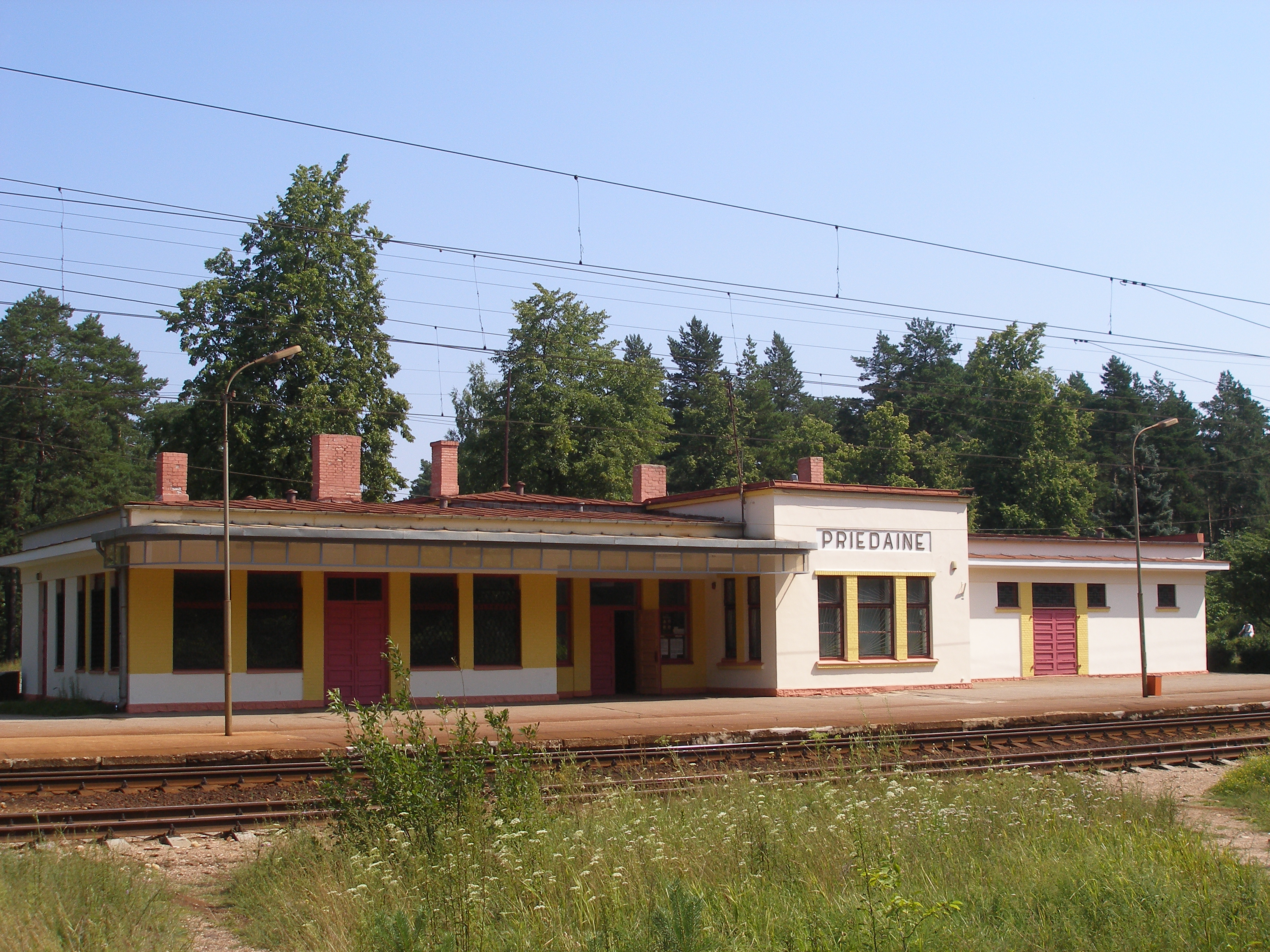 Priedaines stacijas ēka.